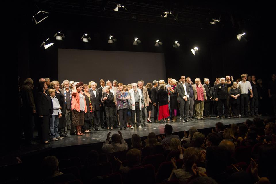 A Budapesti Katona József Színház, "Katona 30" című gálaesten készült felvétel